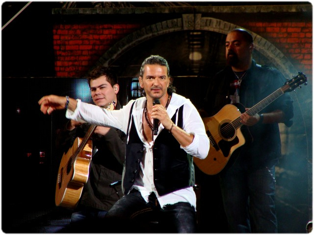 Ricardo Arjona es premiado en el Festival de Viña 2010